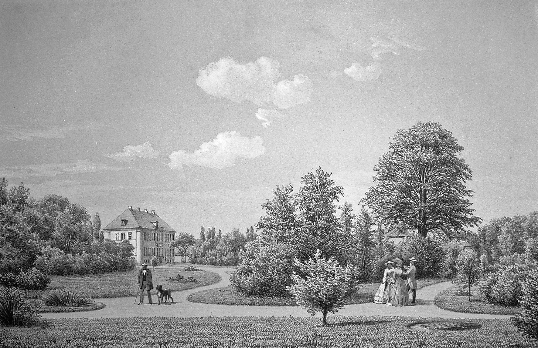 Einsidelsborg, kaldt Egebjerggård fra 1931. Gården ligger i Krogsbølle Sogn, Skam Herred, Otterup Kommune. Hovedbygningen er opført i 1830 ved J. P. Jacobsen.